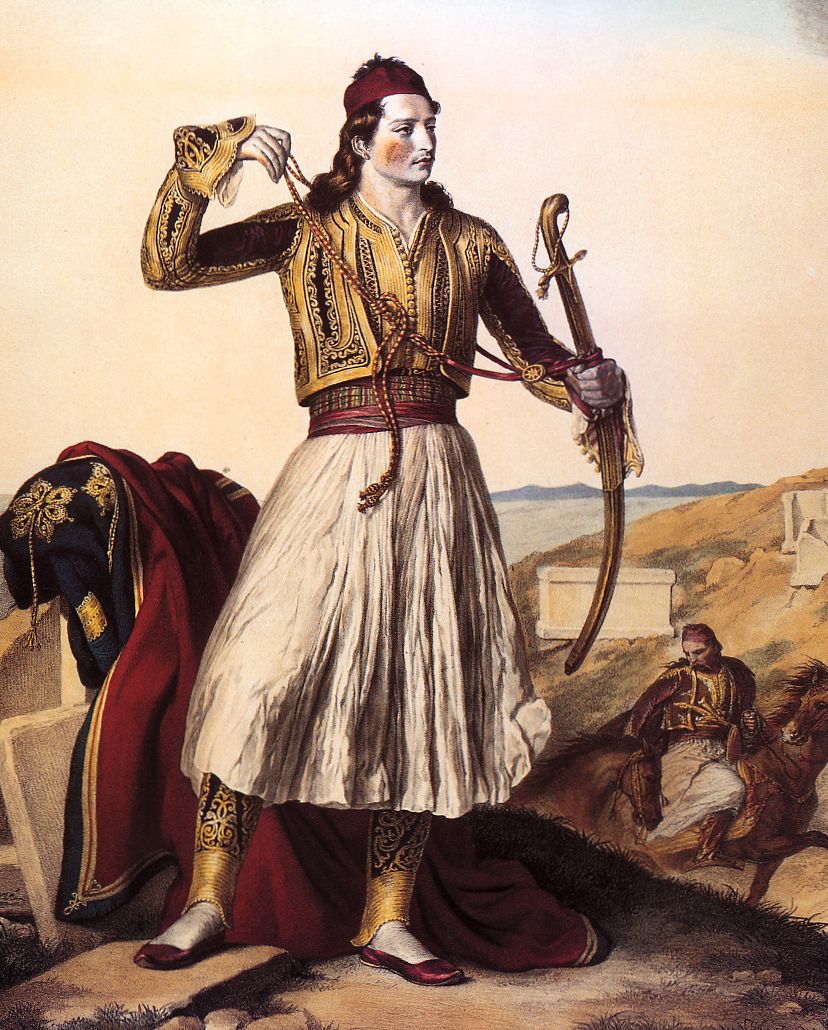 Demetrios Mavromichalis